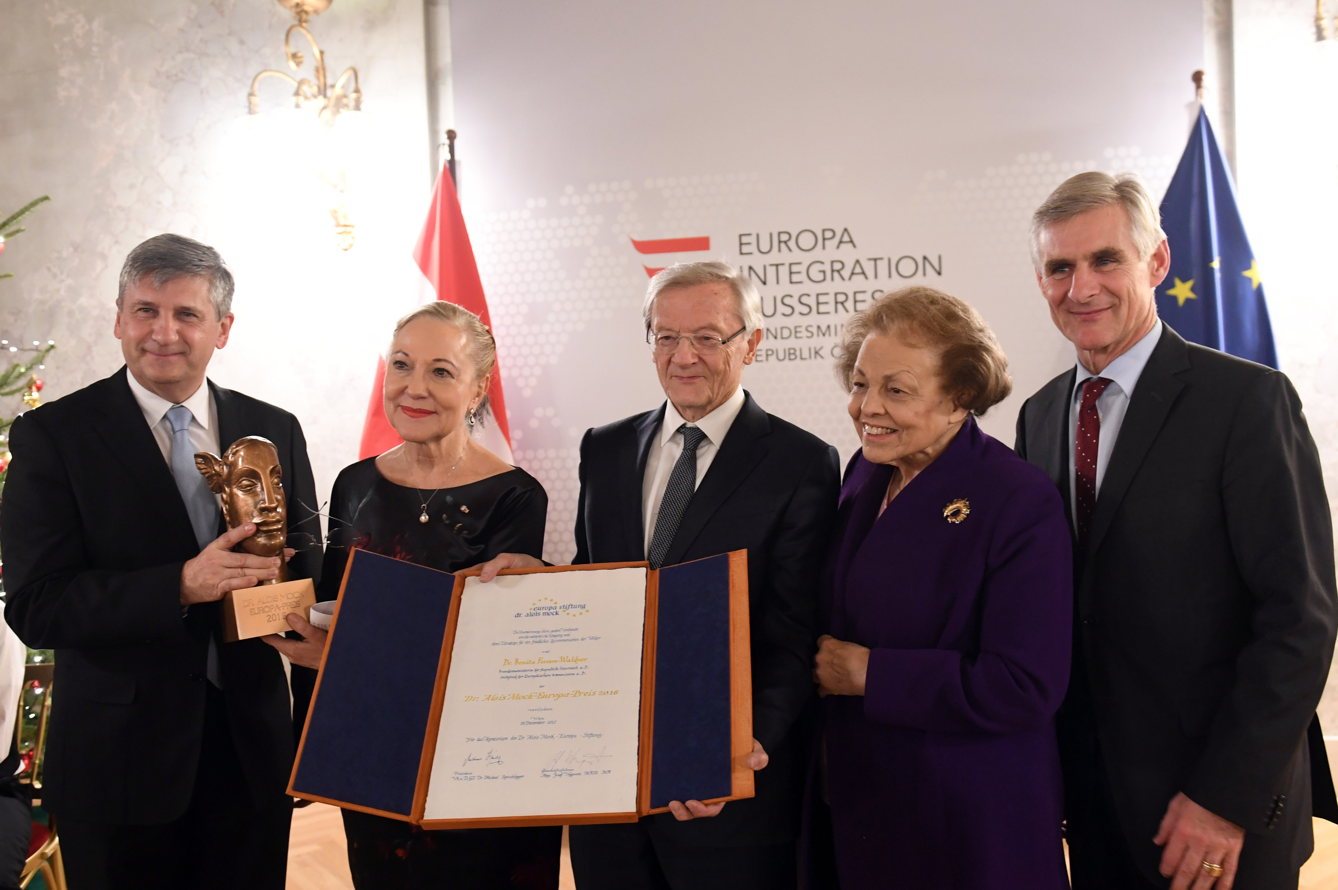 Überreichung des Dr. Alois Mock-Europa-Preises Foto: Mahmoud